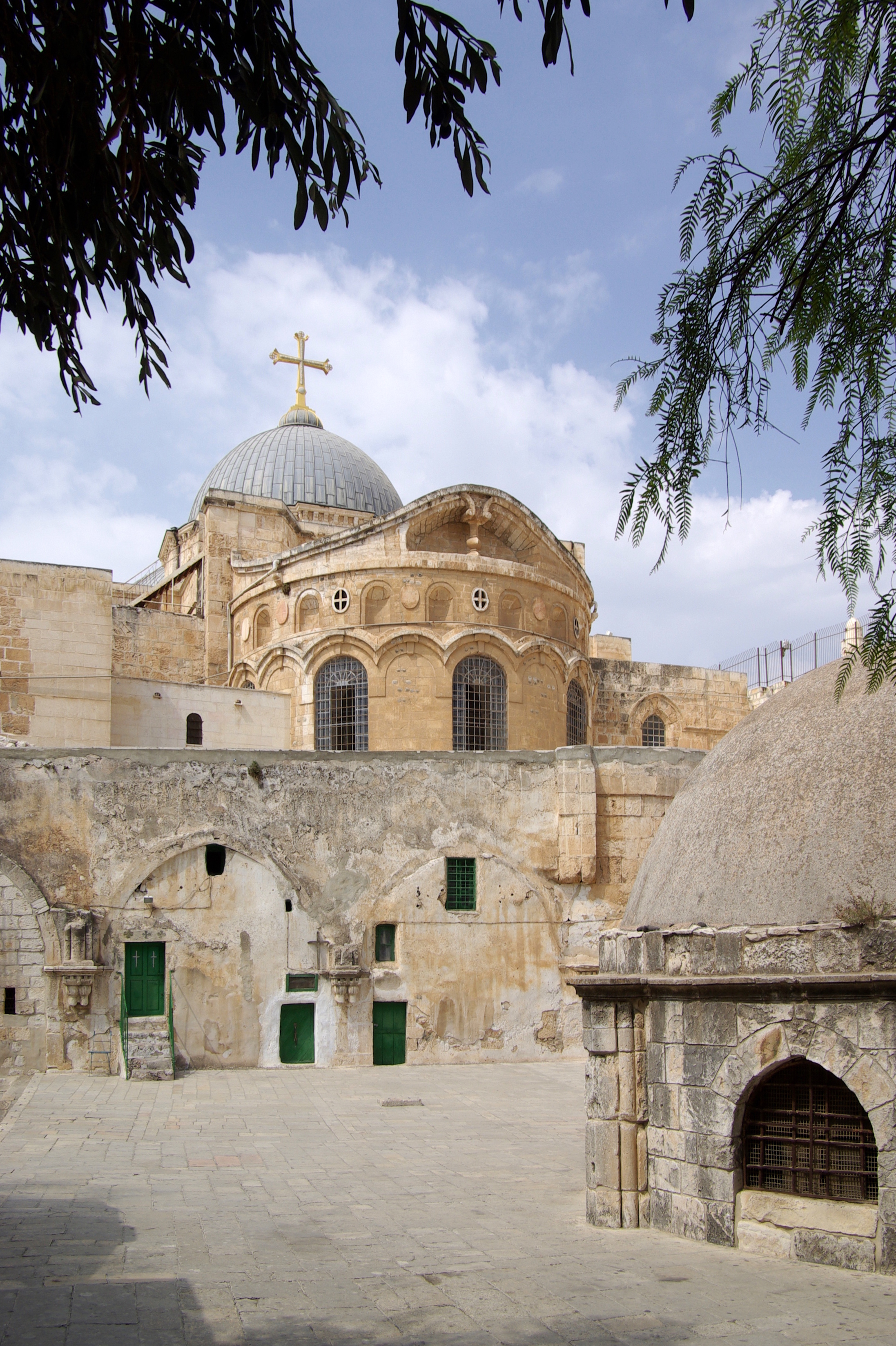 Jerusalem, Grabeskirche, rückseitiger Dachbereich